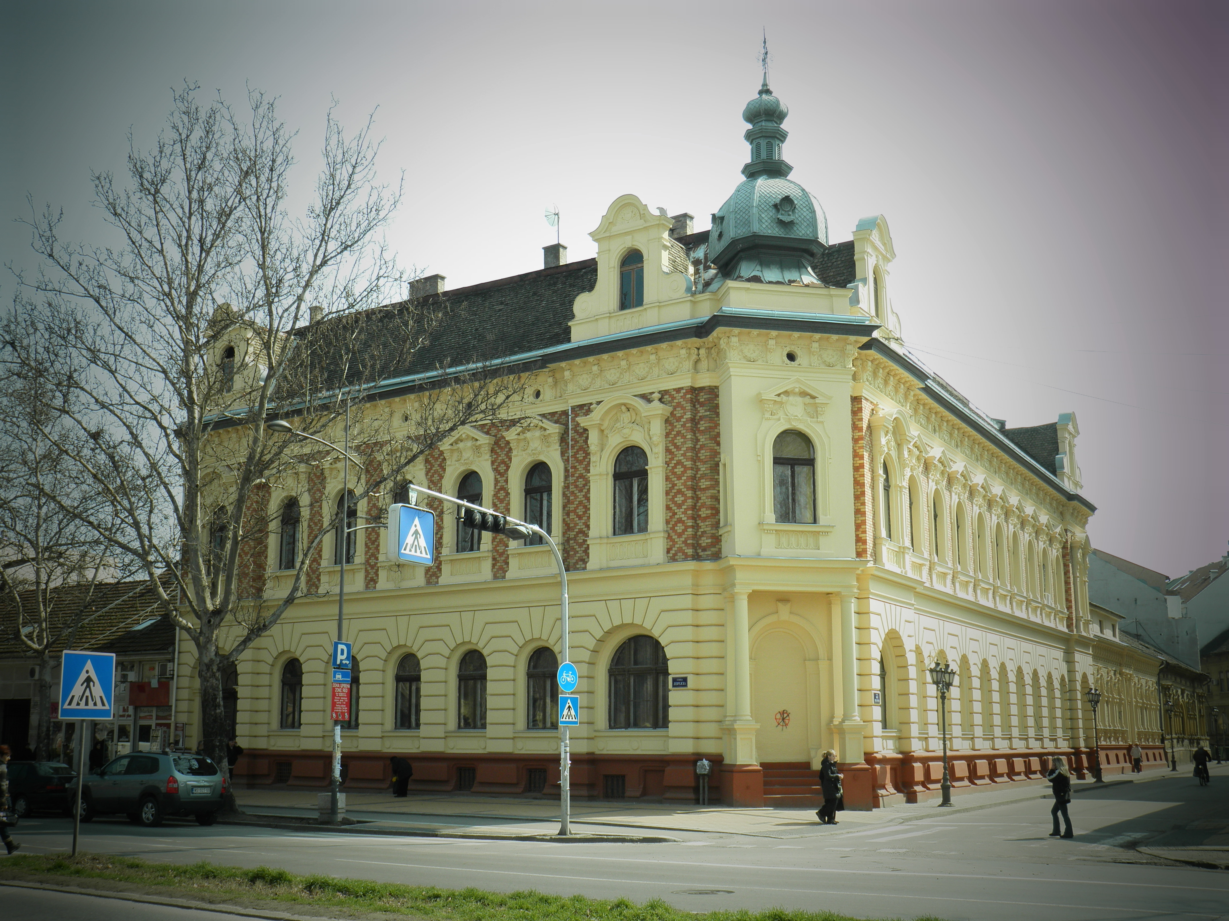 Katastar